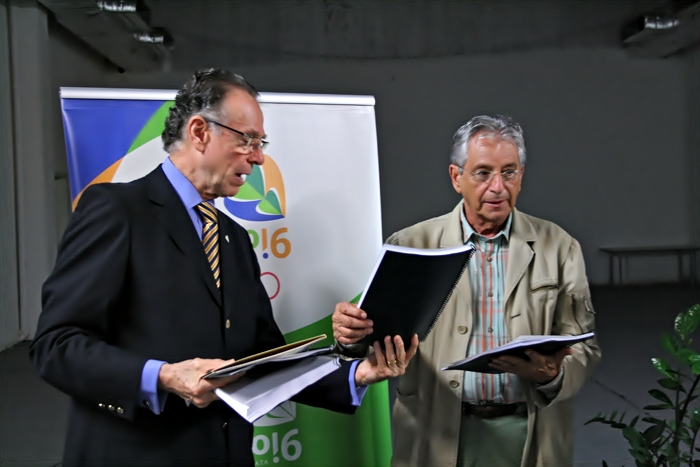 Após a palestra, Gabeira recebe das mãos de Carlos Nuzman os cadernos de encargos para os Jogos Olímpicos de 2016.